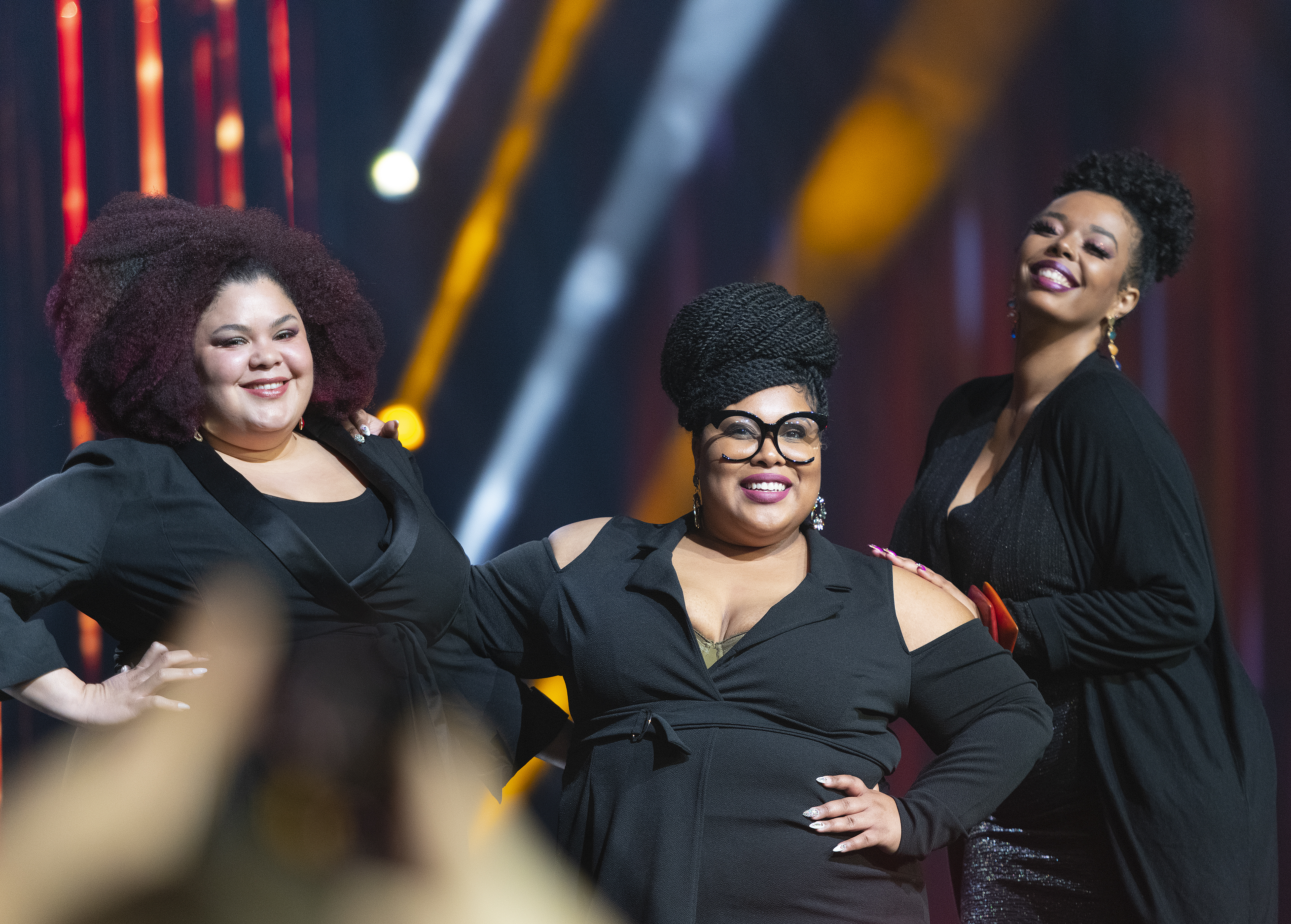 The Mamas Melodifestivalen 2020 presskonferens